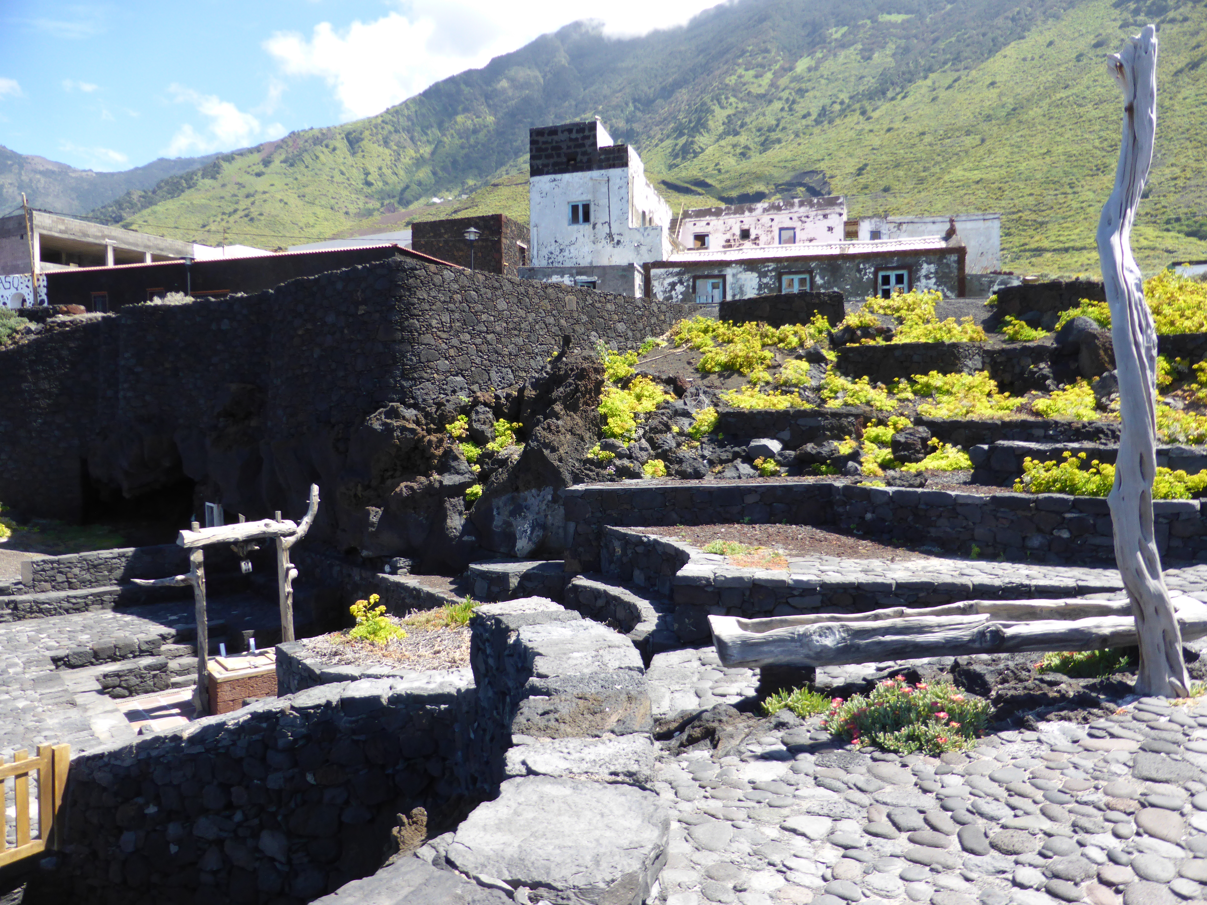 El Pozo de la Salud (antiguamente "Pozo de Sabinosa") es conocido por sus antiguas aguas minero-medicinales. Fue perforado entre los años 1702 y 1704. Abajo, a la izquierda, vemos el brocal del pozo, recubierto modernamente. Más arriba se divisa "Casa Rosa", antiguo lugar de hospedaje.